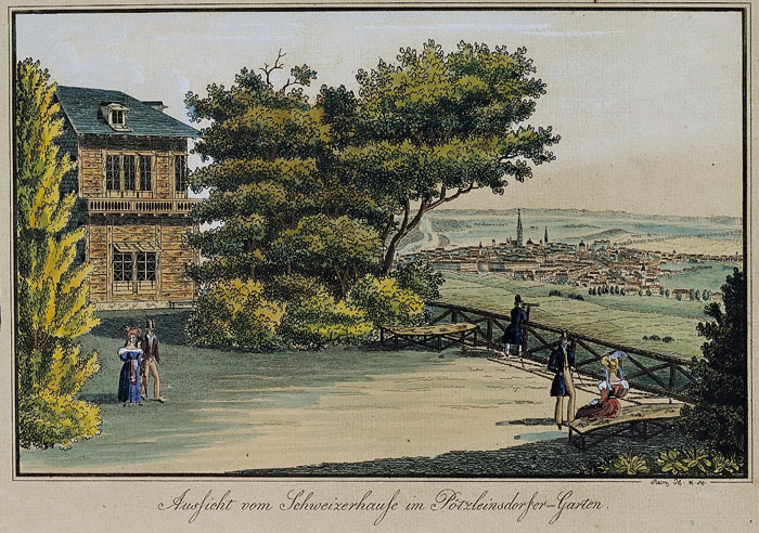 Wien, Vorstädte